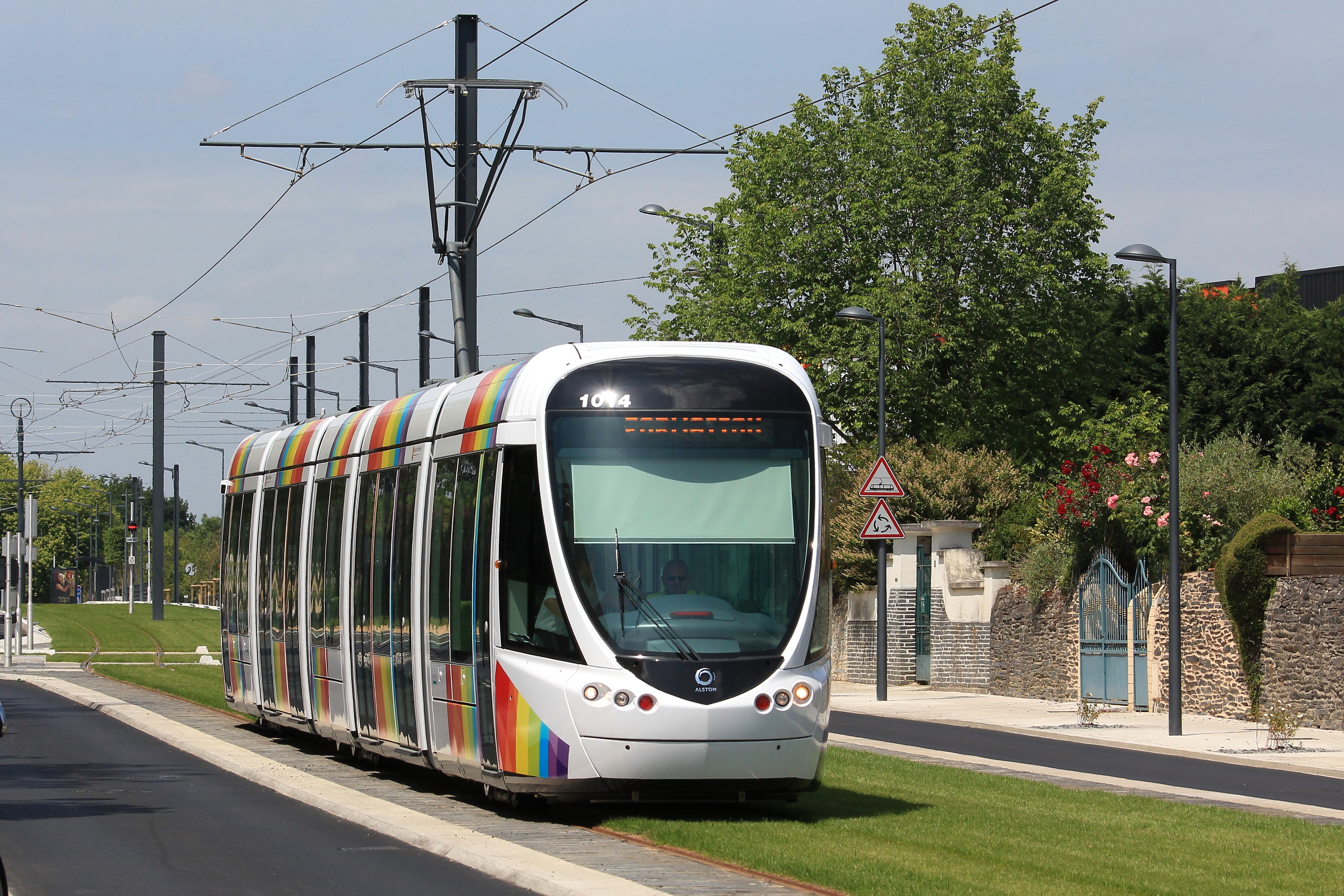 Rame Citadis n°1014 du tramway angevin venant de quitter le terminus nord d'Avrillé Ardennes.